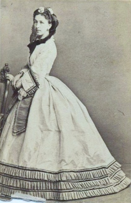 Мария Ивановна Петерсон, ур. Озерова (1836—1906)